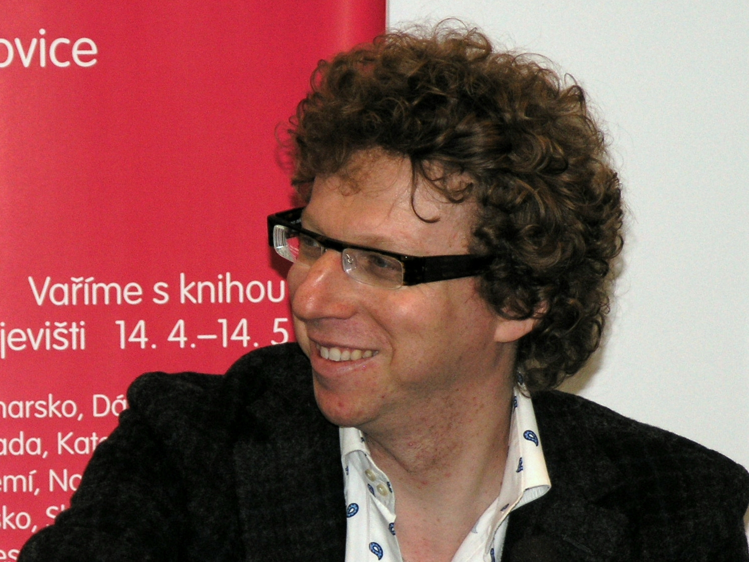 Praha, Svět knihy 2009 - Arnon Grunberg